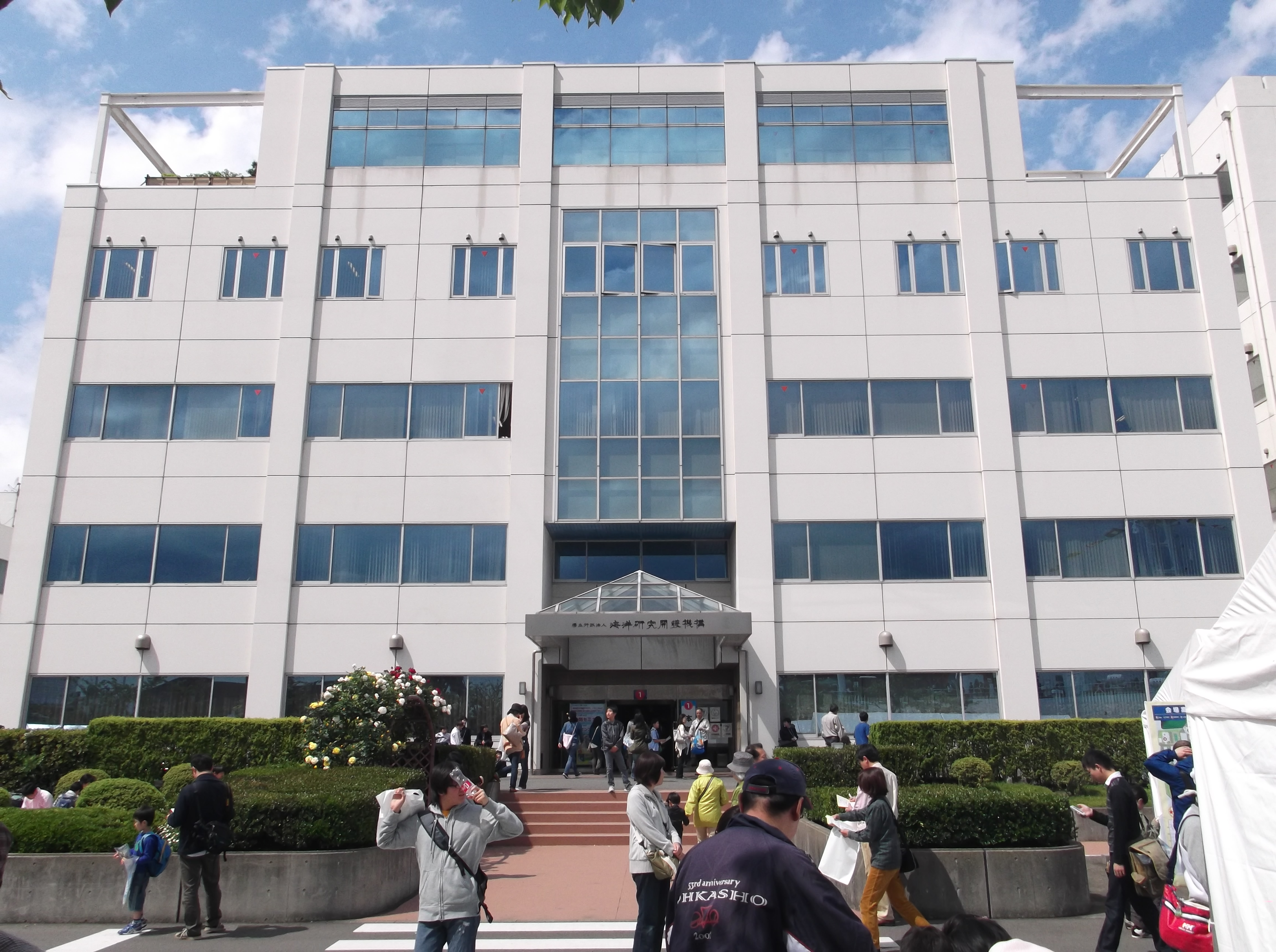 日本海洋研究開発機構(JAMSTEC)本部の建物。2012年5月13日の施設一般公開で撮影。